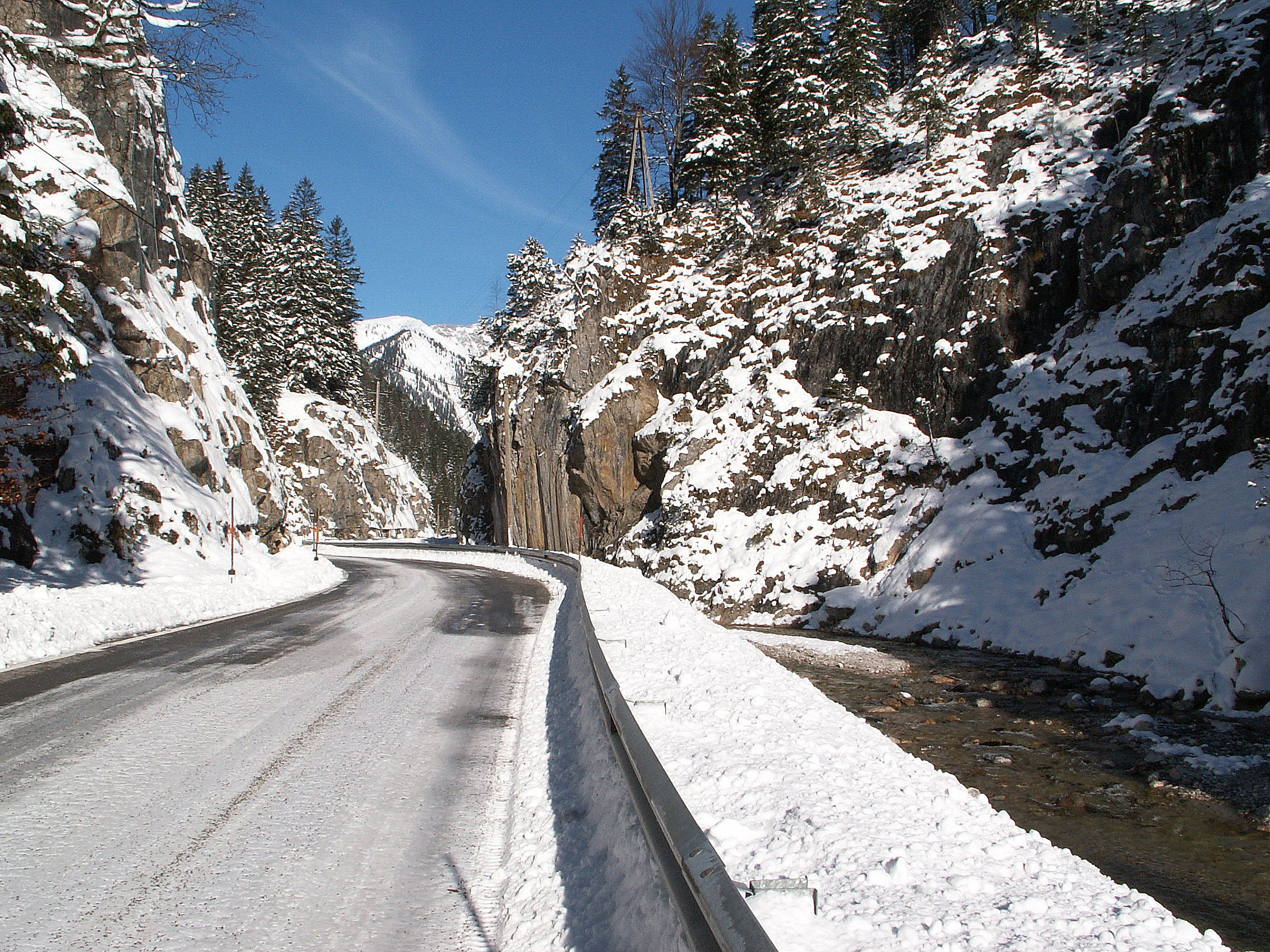 Ammersattel, Tirol - Auffahrt vom Plansee